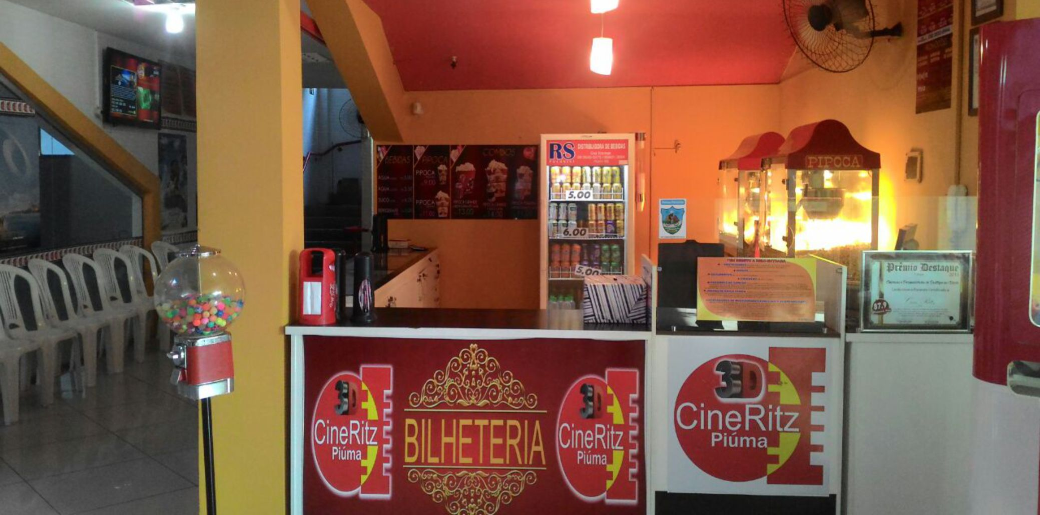 Bilheteria e bomboniere do Cine Ritz Piúma